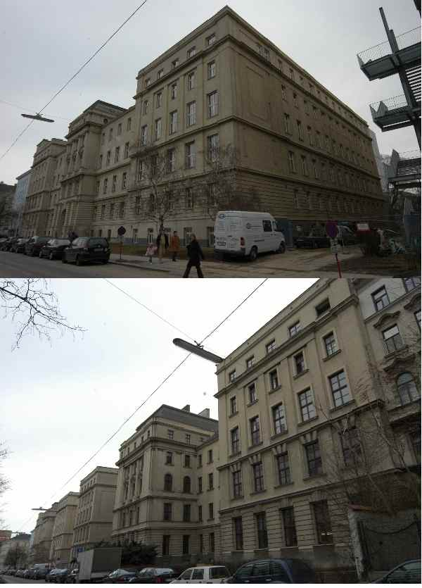 ehem. k.k. Franz-Joseph-Militärakademie im 3. Wiener Gemeindebezirk. Das Gebäude Boerhaavegasse 13 gehört zur Rudolfstiftung. Das Gebäude Boerhaavegasse 15 wird heute als Schule genutzt. Quelle: GuentherZ Fotograf/Zeichner: GuentherZ Datum: 18. Februar 2006 andere Versionen